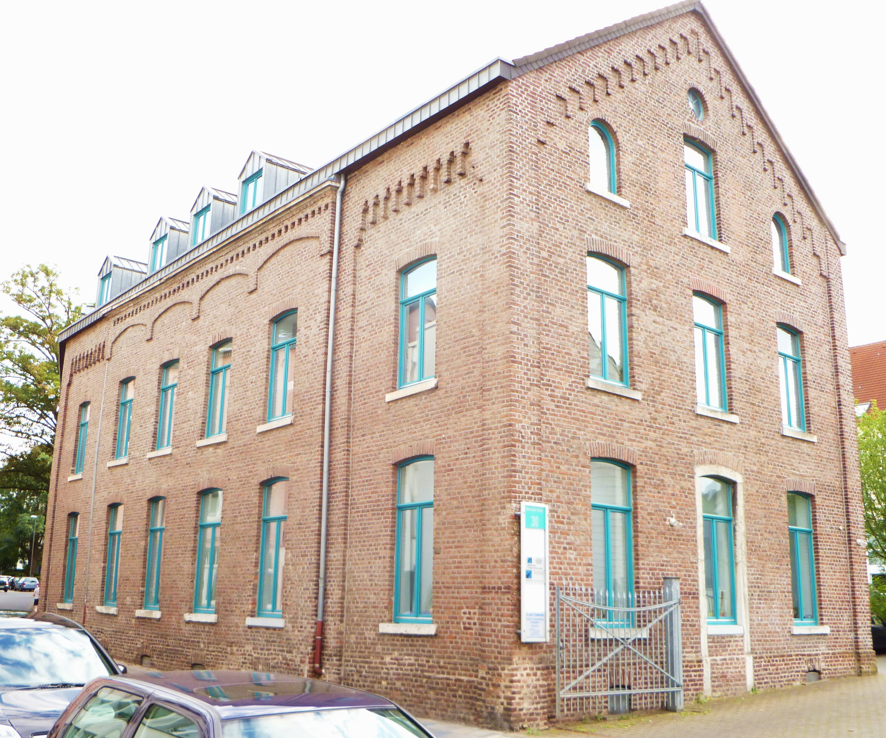 Gebäudedenkmal Malmedyer Straße 30